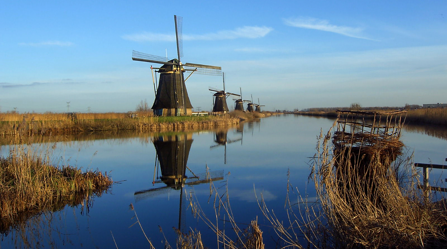 Kinderdijk windmills, Netherlands